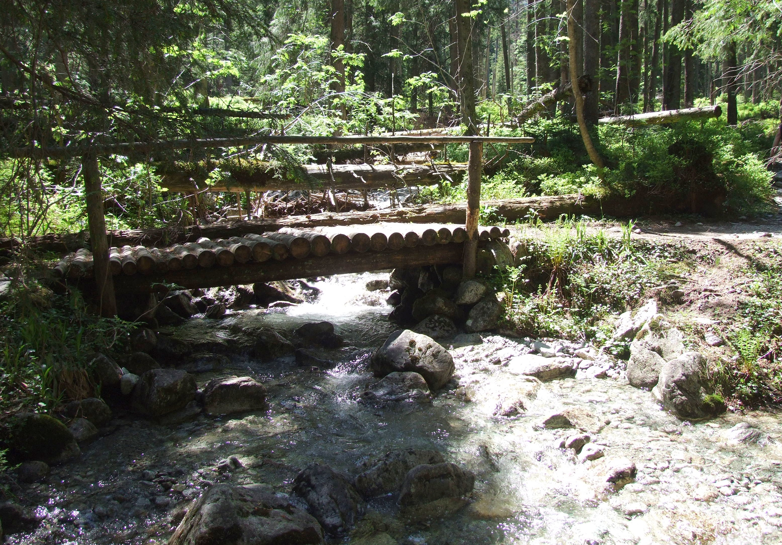 Świstowy Potok przy ujściu do Doliny Białej Wody